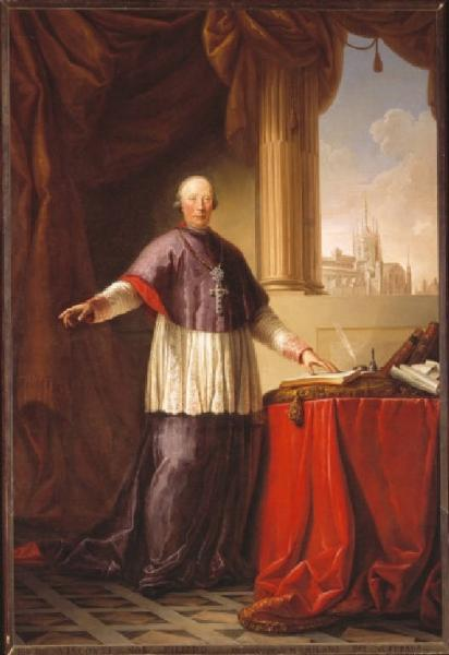 Filippo Maria Visconti, Arcivescovo di Milano 1784-1801